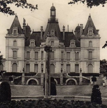 chateau du Terral, Ouveillan